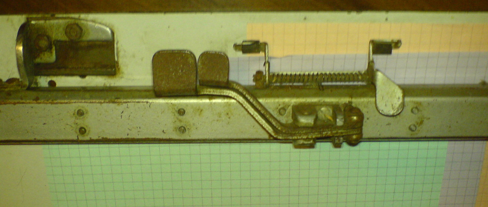 kontownica - mechanizm przytrzymujący formularze (kontownica1.jpg)